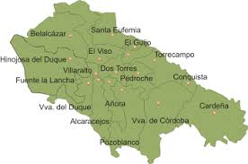 Limites pedroche